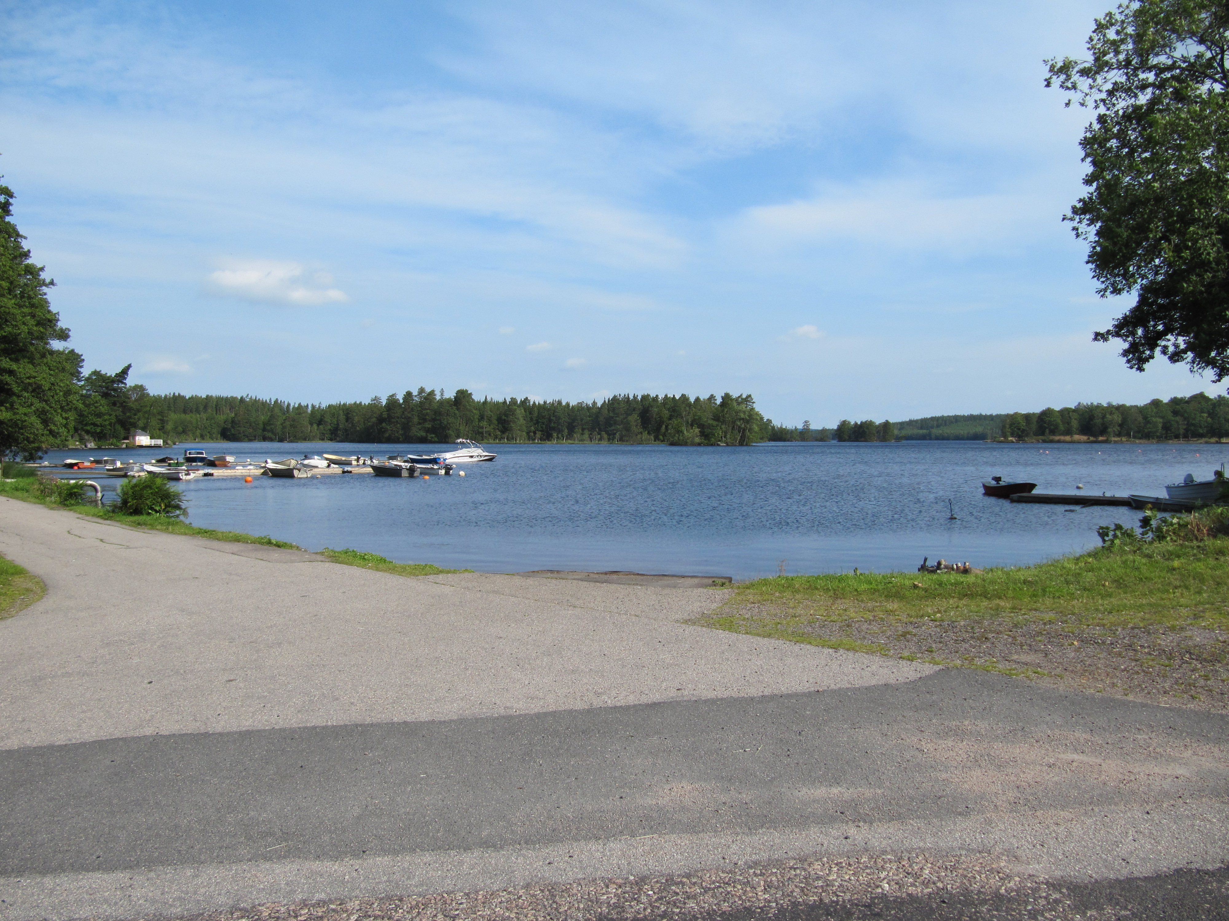 Änghultasjön fotograferad vid kvarnen i Klavreströms bruk